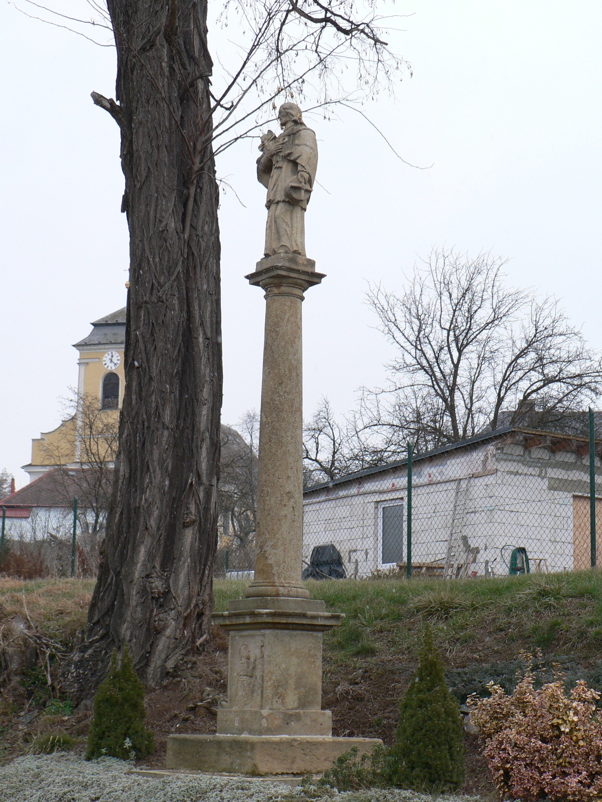 Sloup se sv. Janem Nepomuckým v Nové Hradečné